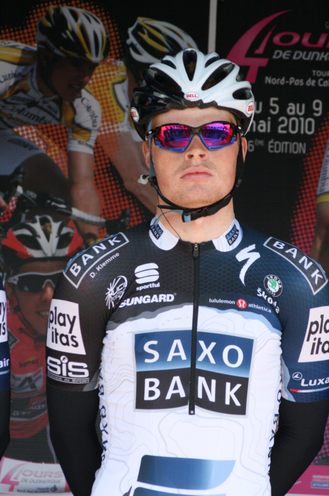 Dominic Klemme, lors de la présentation des équipes des 4 jours de Dunkerque 2010